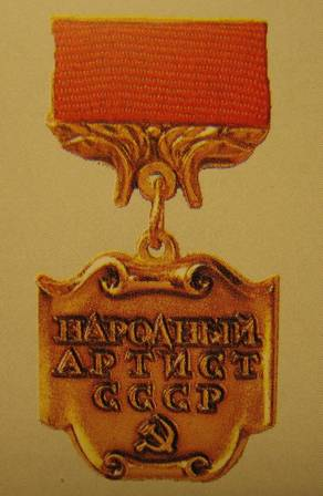 Знак «Народный артист СССР»